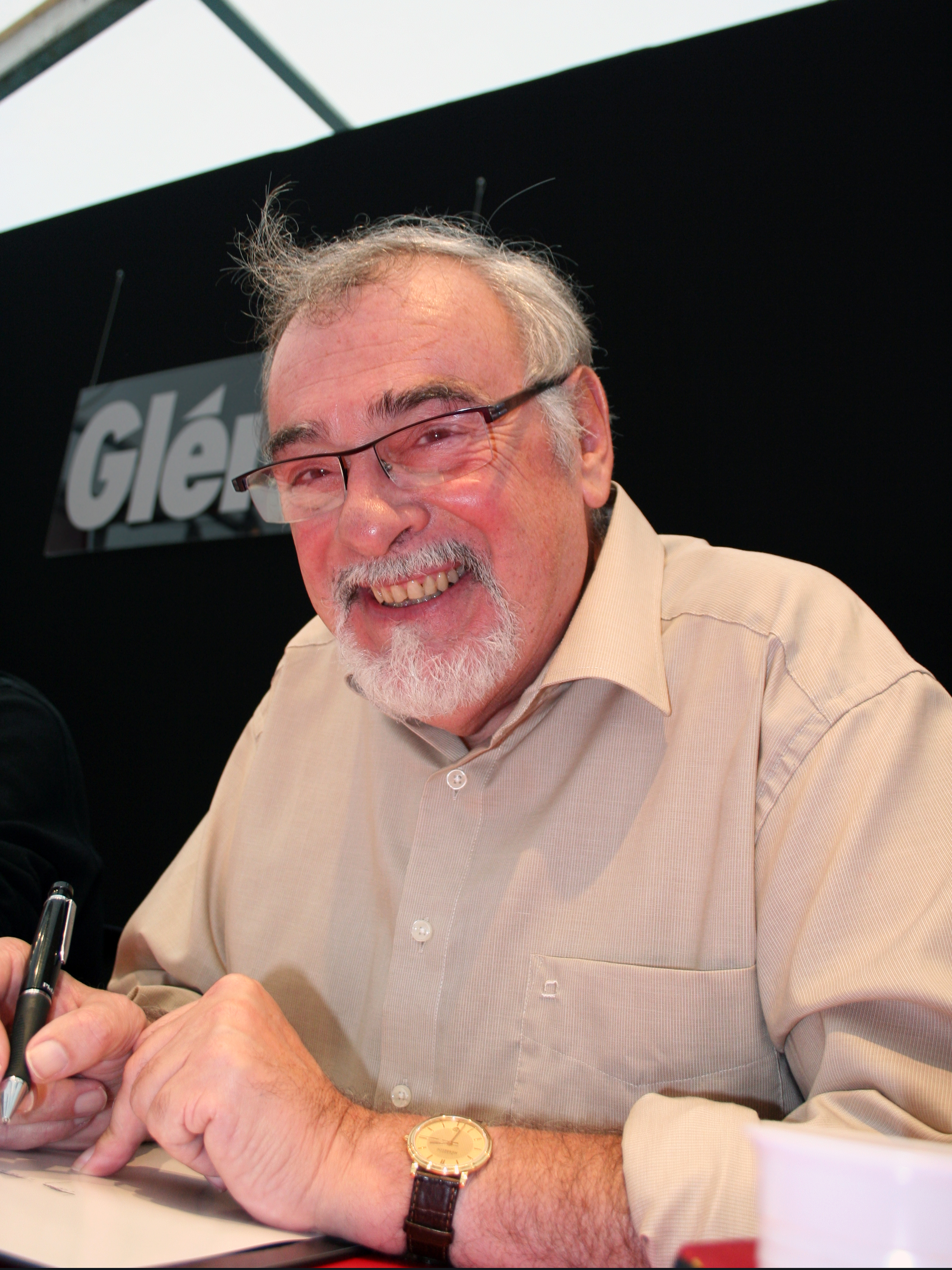 auteur de bande dessinée, lors du salon Quai des Bulles à Saint-Malo, France, en octobre 2008